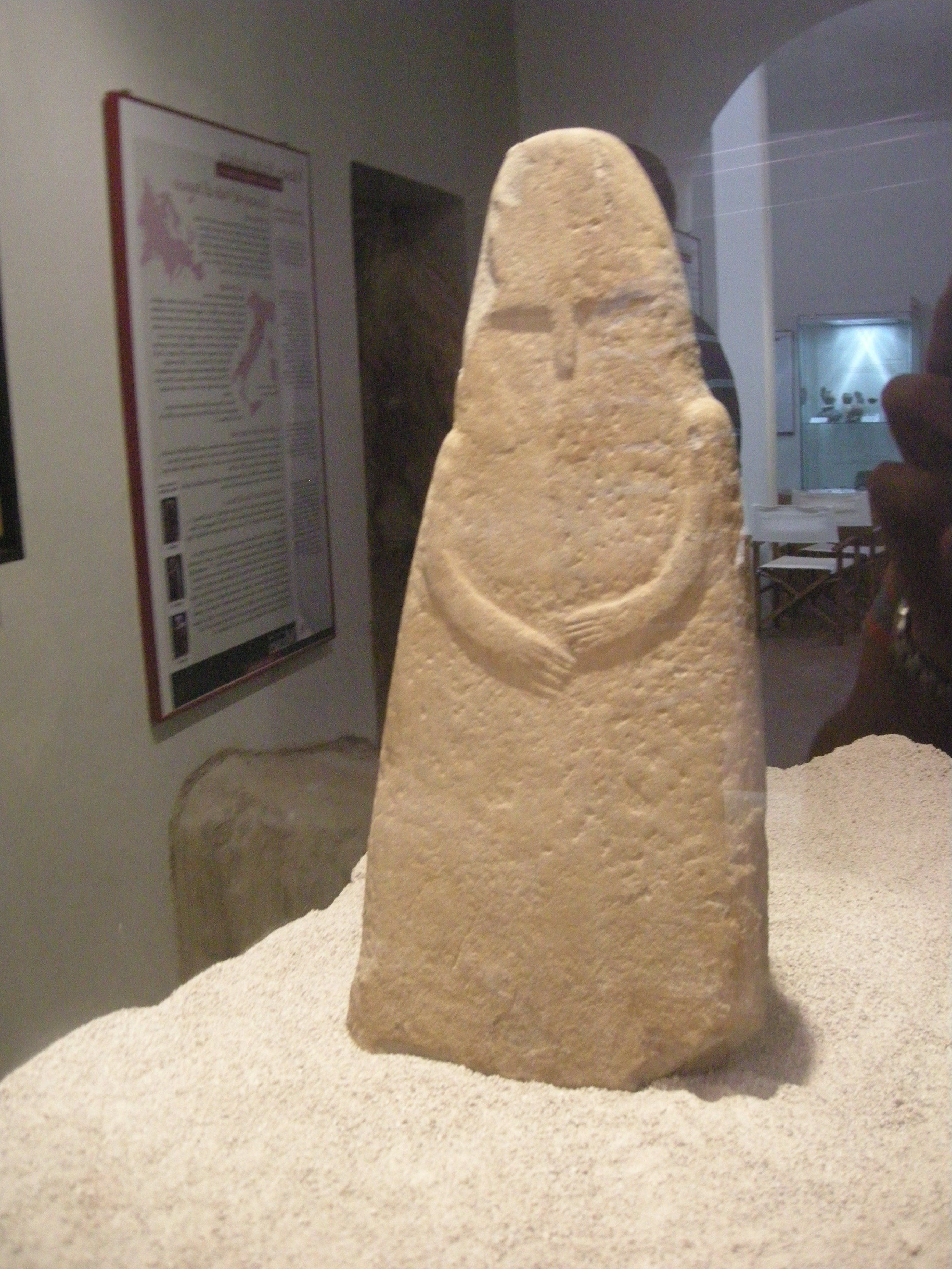 Museo archeologico di massa marittima, stele antropomorfa del III millennio ac